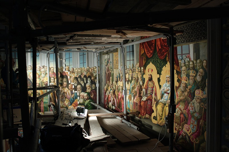 Процесс восстановления Успенского собора Киево печерской Лавры.